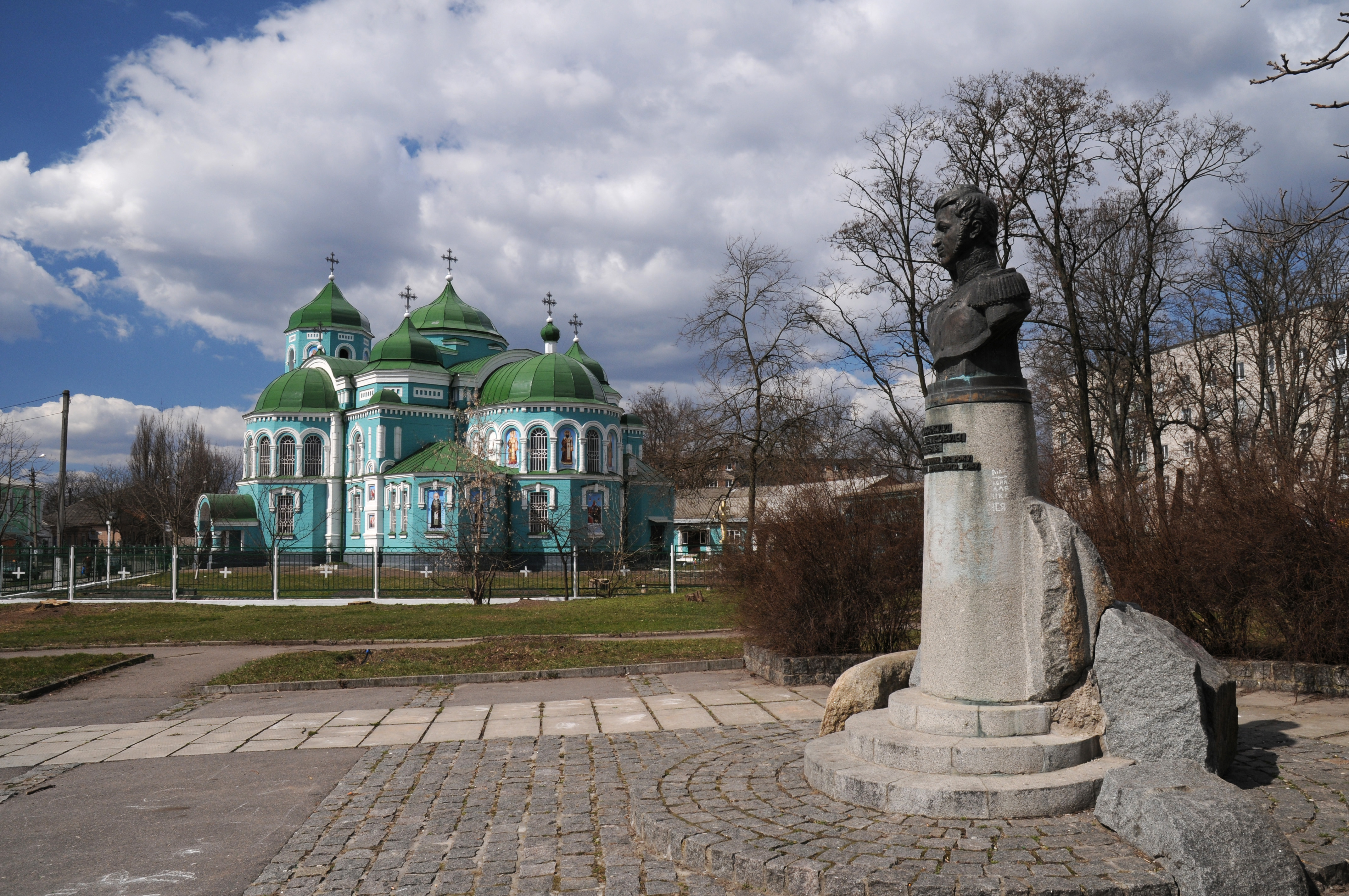 Золотоноша, пам.Невіровському та Успенський собор .ua/2009/12/zolotonoschyna/